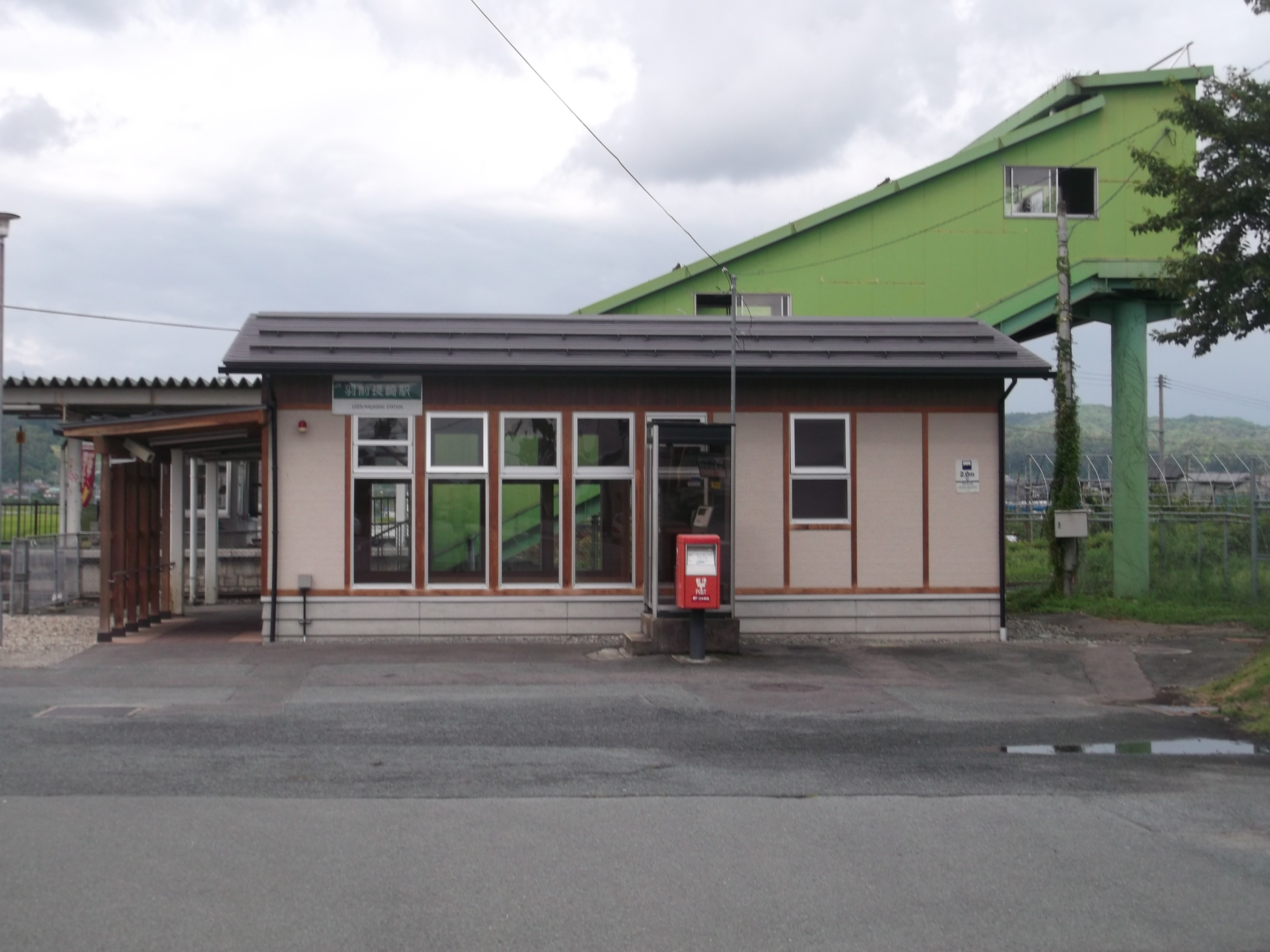 羽前長崎駅東口